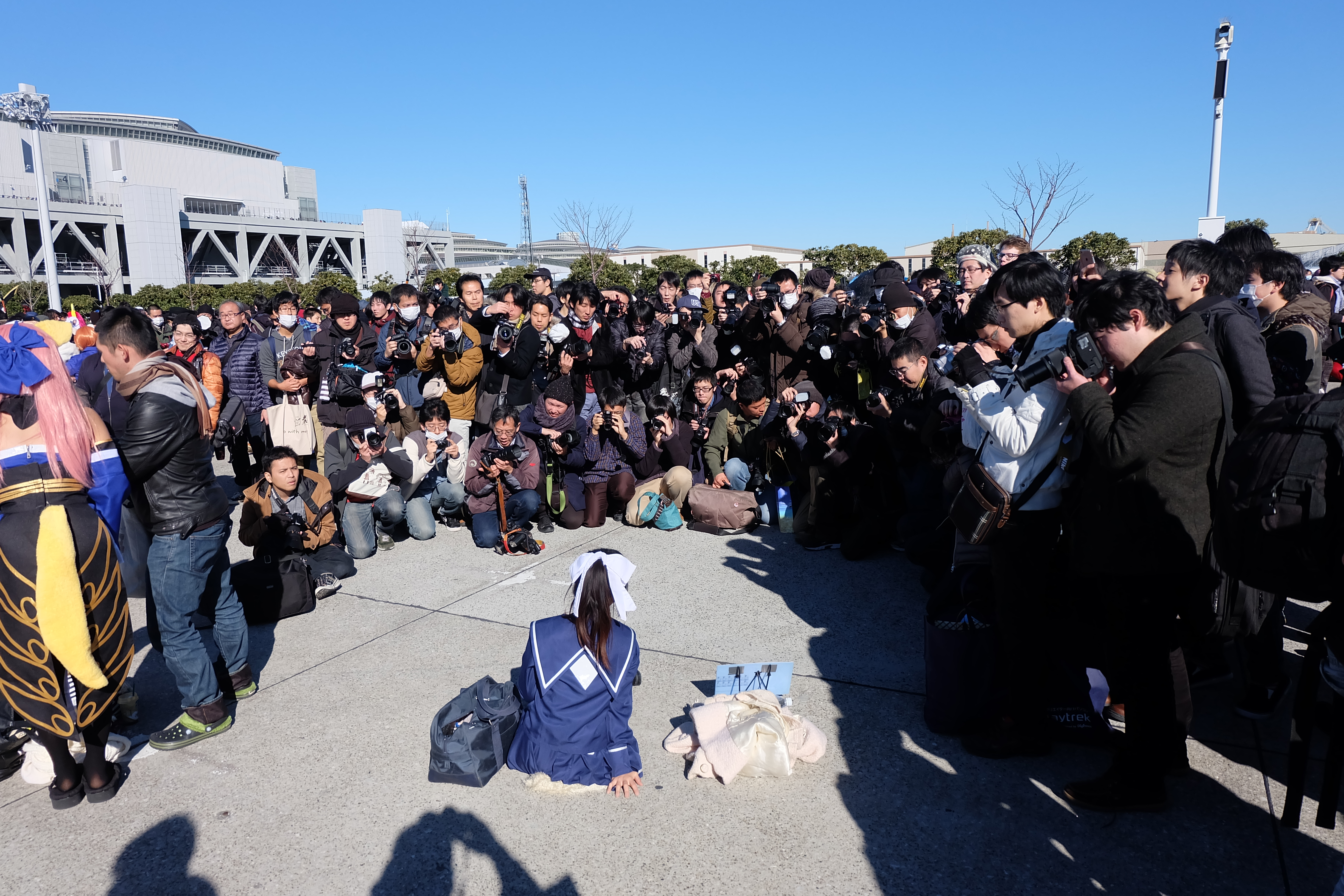 コミックマーケット89のコスプレ広場にて、コスプレイヤーを撮影するカメラマンの群れ